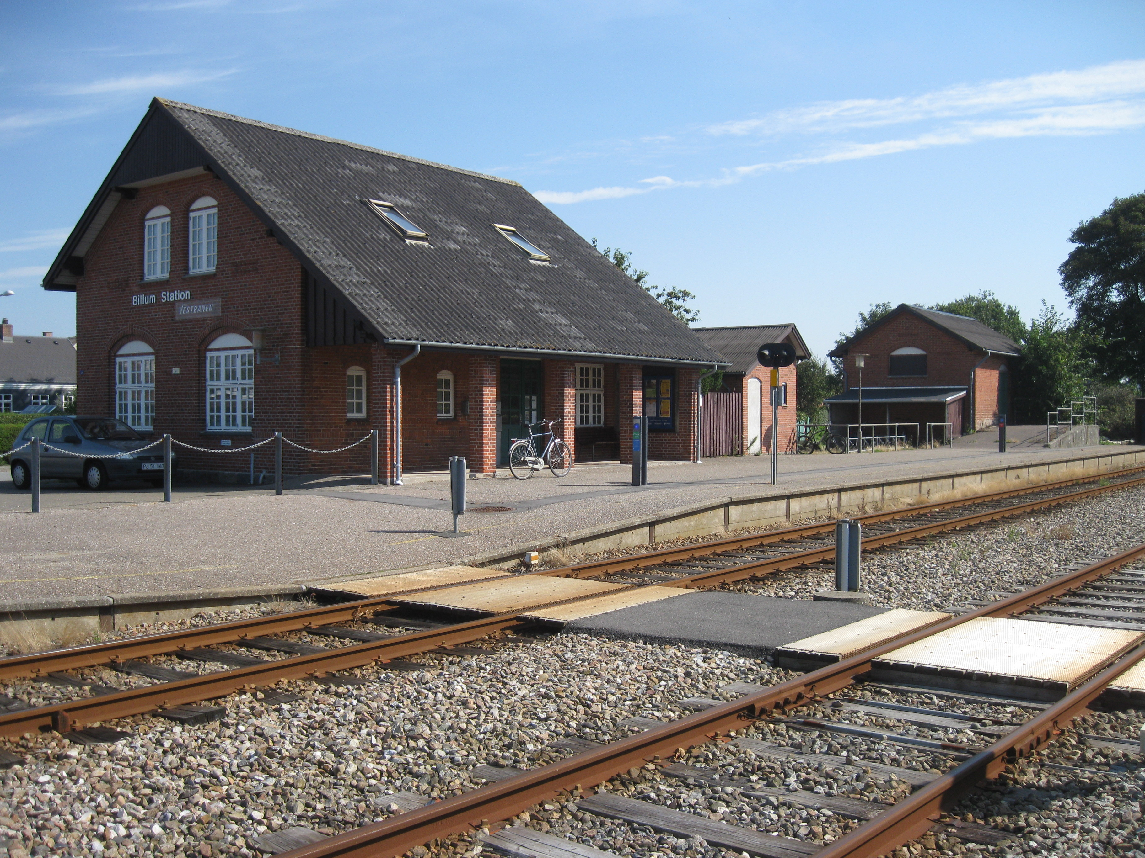 Billum Station på Vestbanen